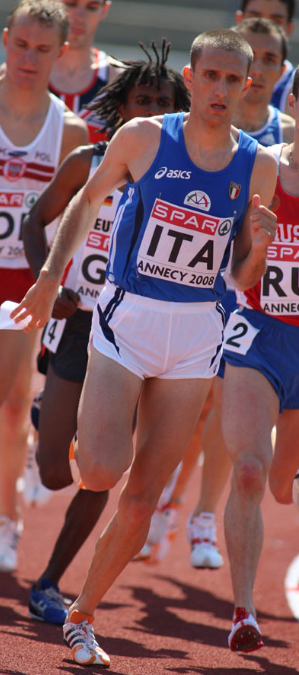 Coppa Europa Annecy 3000siepi